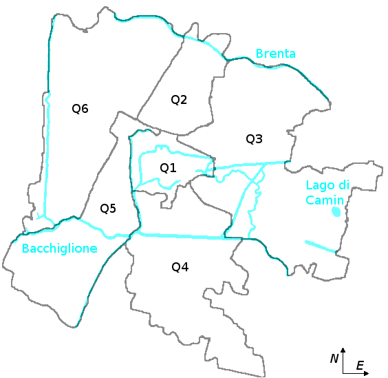 Mappa di Padova